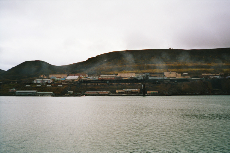 Beschreibung: Barentsburg vom Meer aus Quelle: Fotografiert im August 2004 Fotograf: Andreas Fischnaller (für die GNU FDL) (für Public Domain)